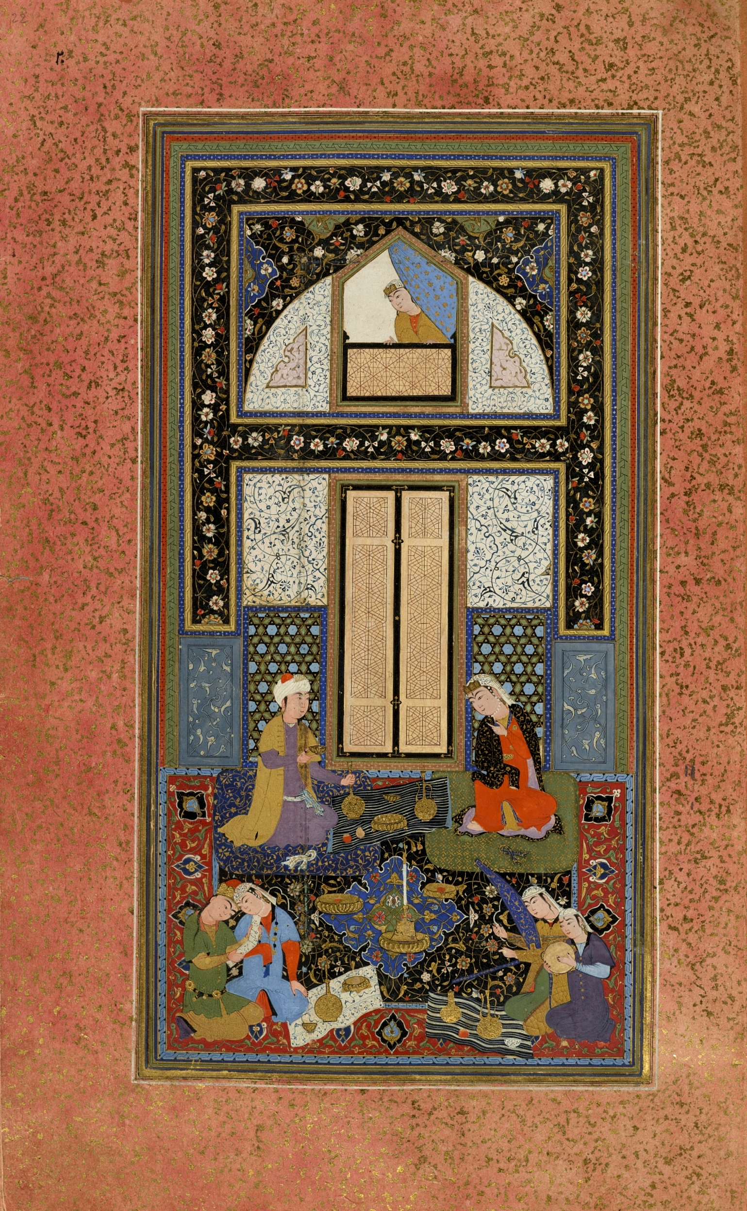 Шейхзаде. Бахрам Гур и принцесса в чёрном павильоне. «Хафт манзар» Хатифи. Бухара. 1538 г. Галерея Фрир, Вашингтон.